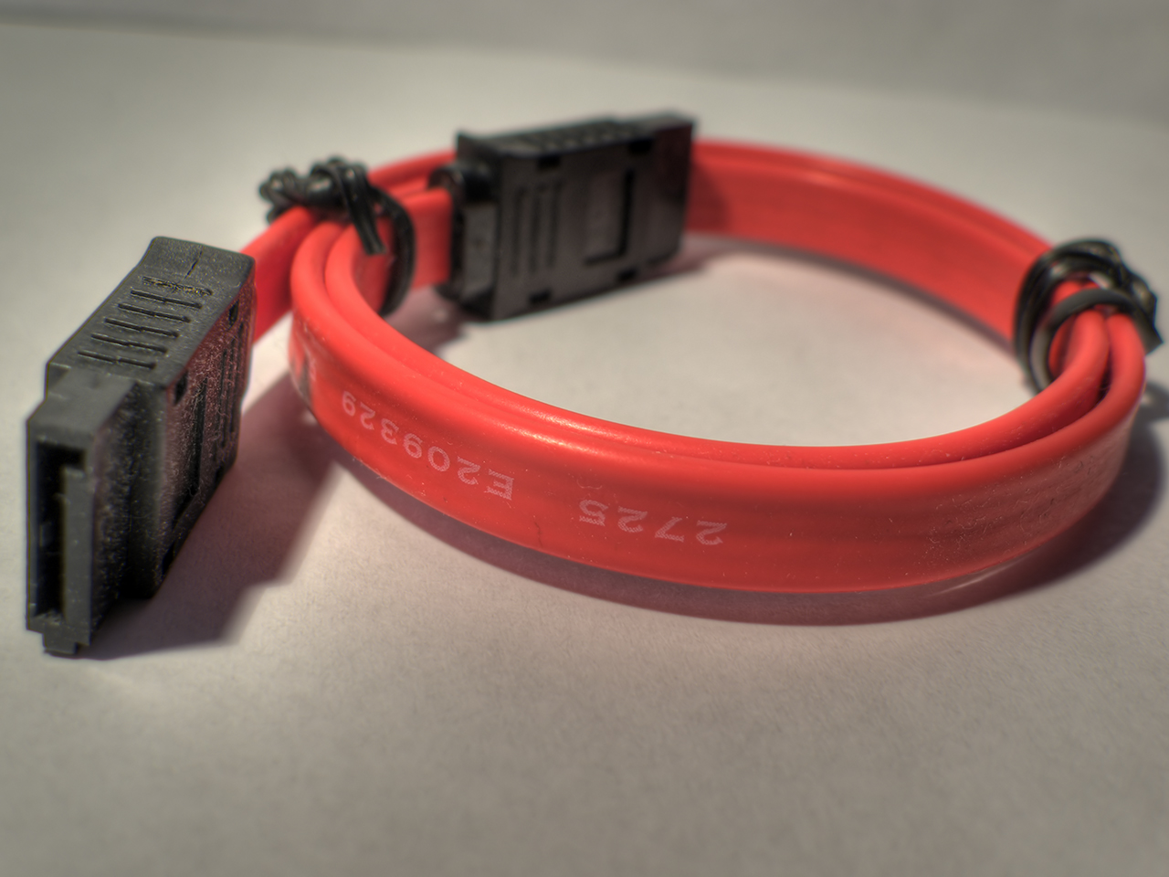 SATA